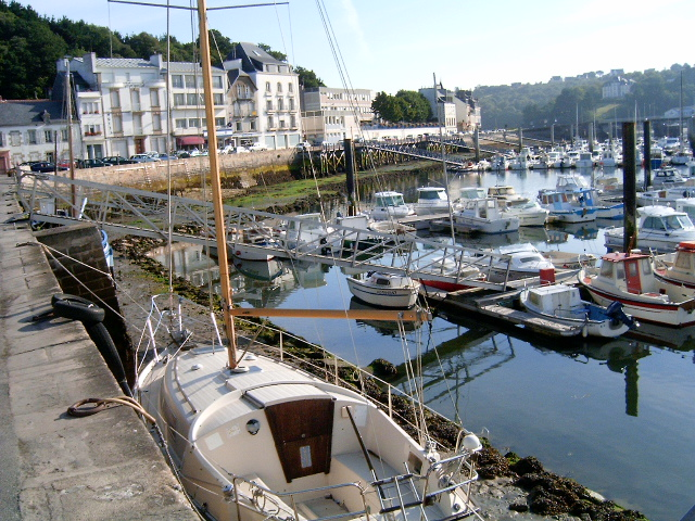 Le port d'Audierne (29).